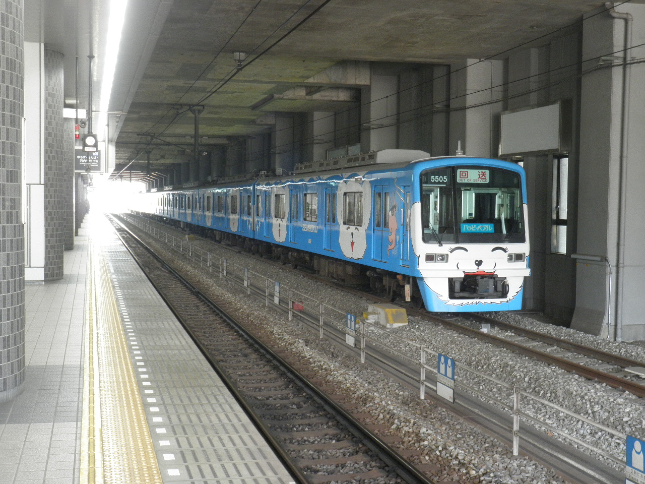 ホームの外側には引上げ線がある